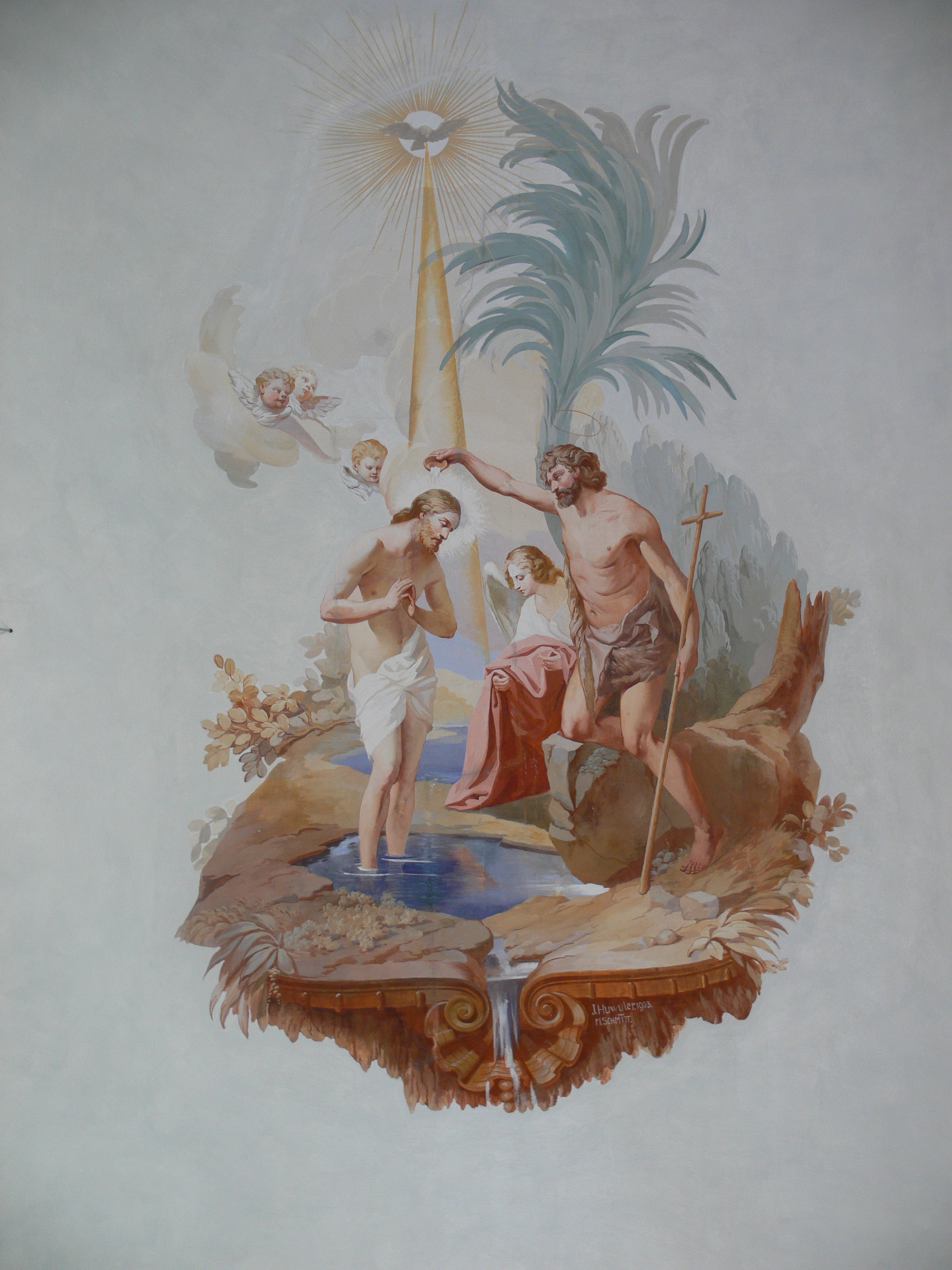 Filialkirche St. Johannes der Täufer, Ermengerst (Ortsteil von Wiggensbach) Jakob Huwyler: Deckengemälde "Taufe Christi", 1903